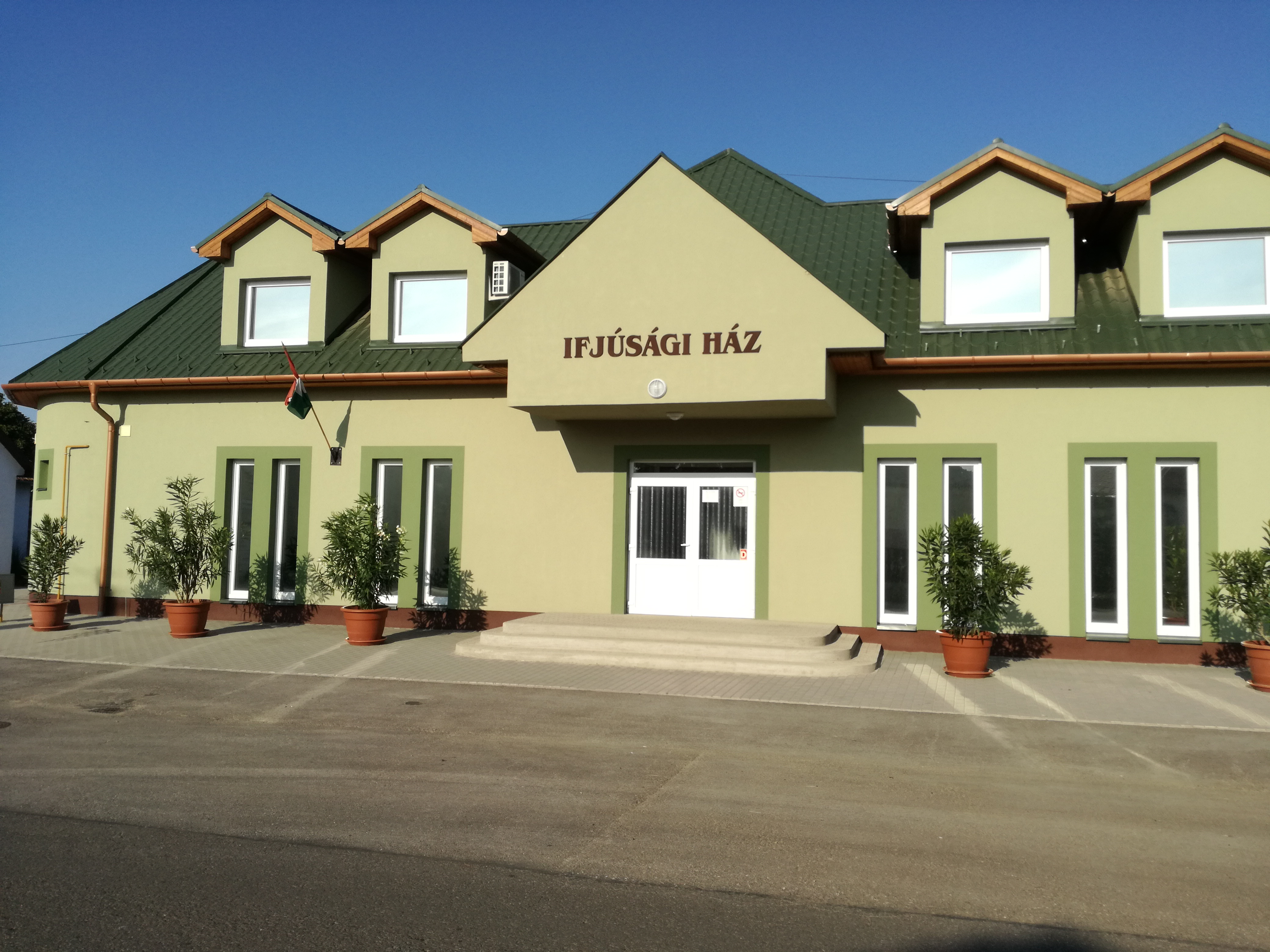 patrohai ifjúsági ház